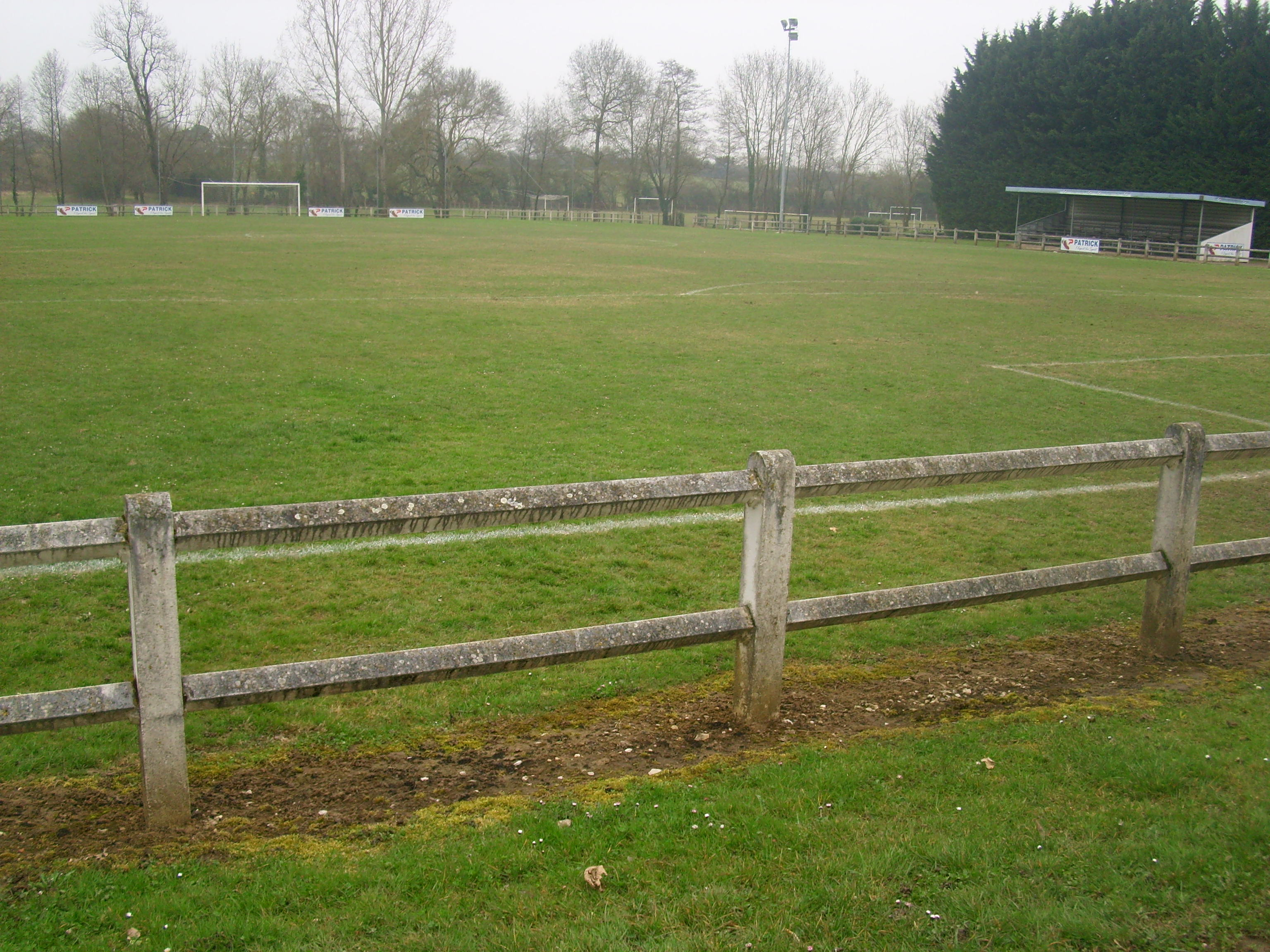 Stade de football de Mervans (71)